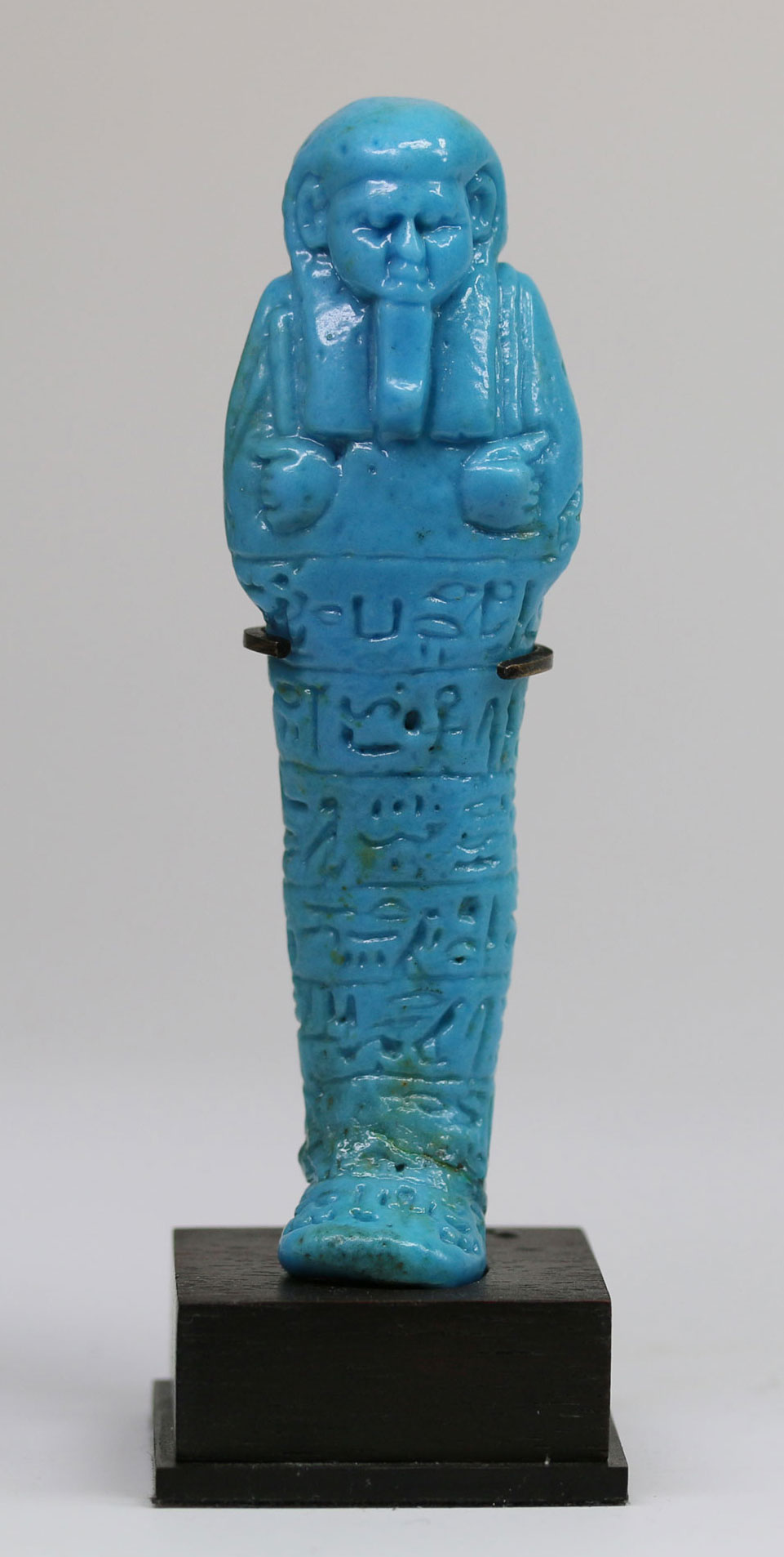 Fayence Uschebti für den berühmten Gouverneur von Oberägypten Anch-Hor